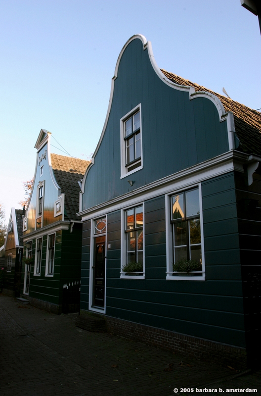 (c) Barbara B. Amsterdam // Website